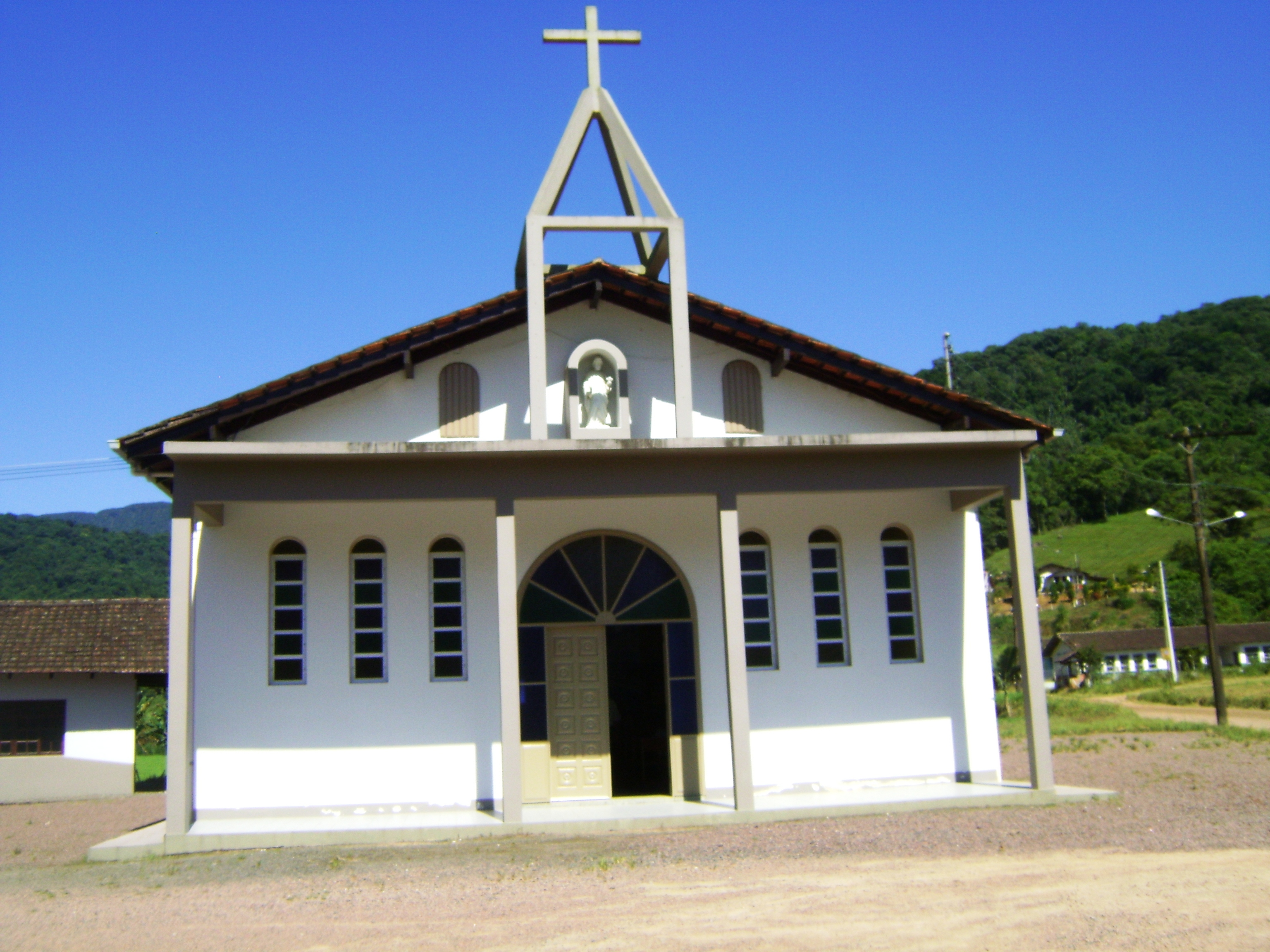 Igreja São Pedro velho